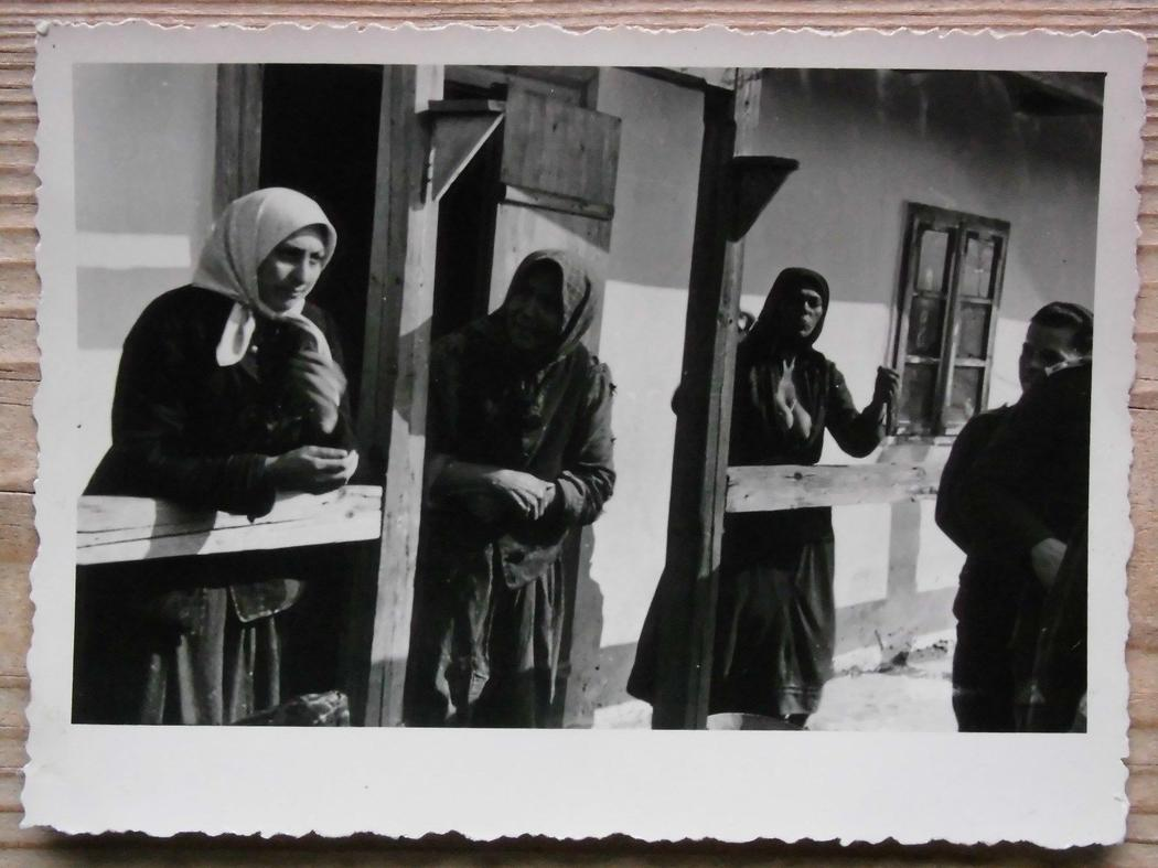 Srpski (latinica): Fotografija javne kuće za nemačke vojnike, u Drugom svestskom ratu, snimljena negde na Balkanu, u Jugoslaviji, Bugarskoj ili Grčkaoj. privatna zbirka Dušan Napijalo